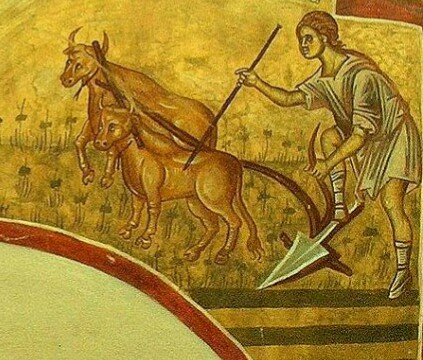 Српски (ћирилица): Орач, двостано рало и волови. Фреска из Дечана, Каин и Авељ приносе жртву Богу, детаљ.